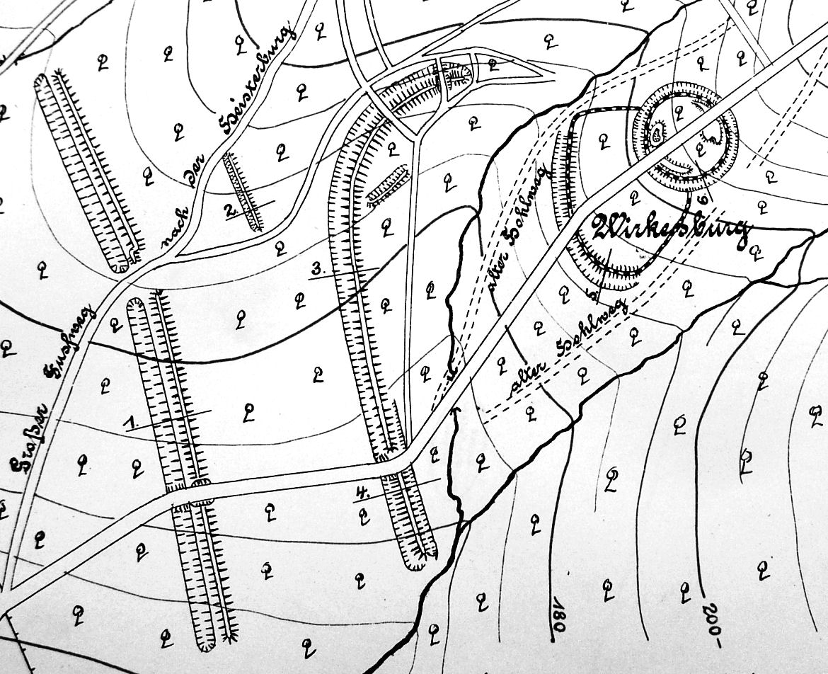 Wirkesburg